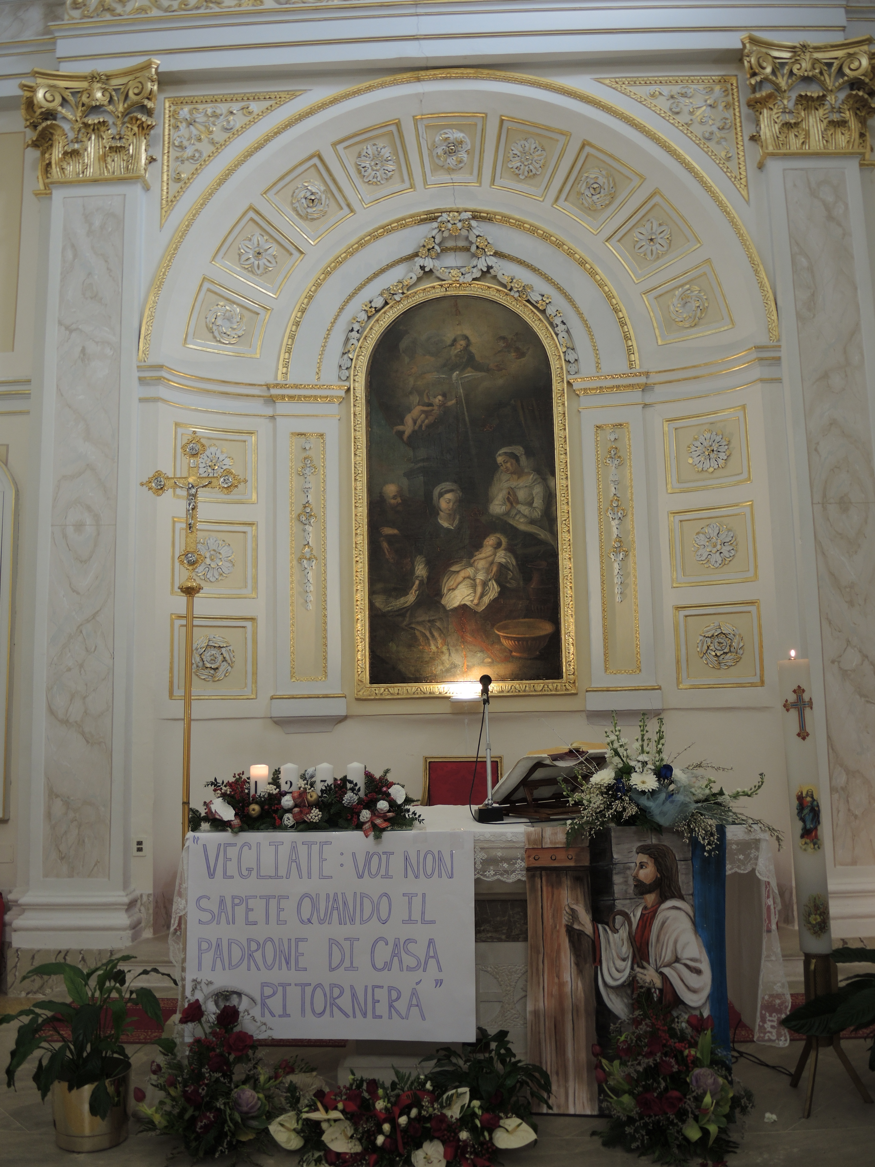 Casalincontrada; Chiesa di Santa Maria delle Grazie